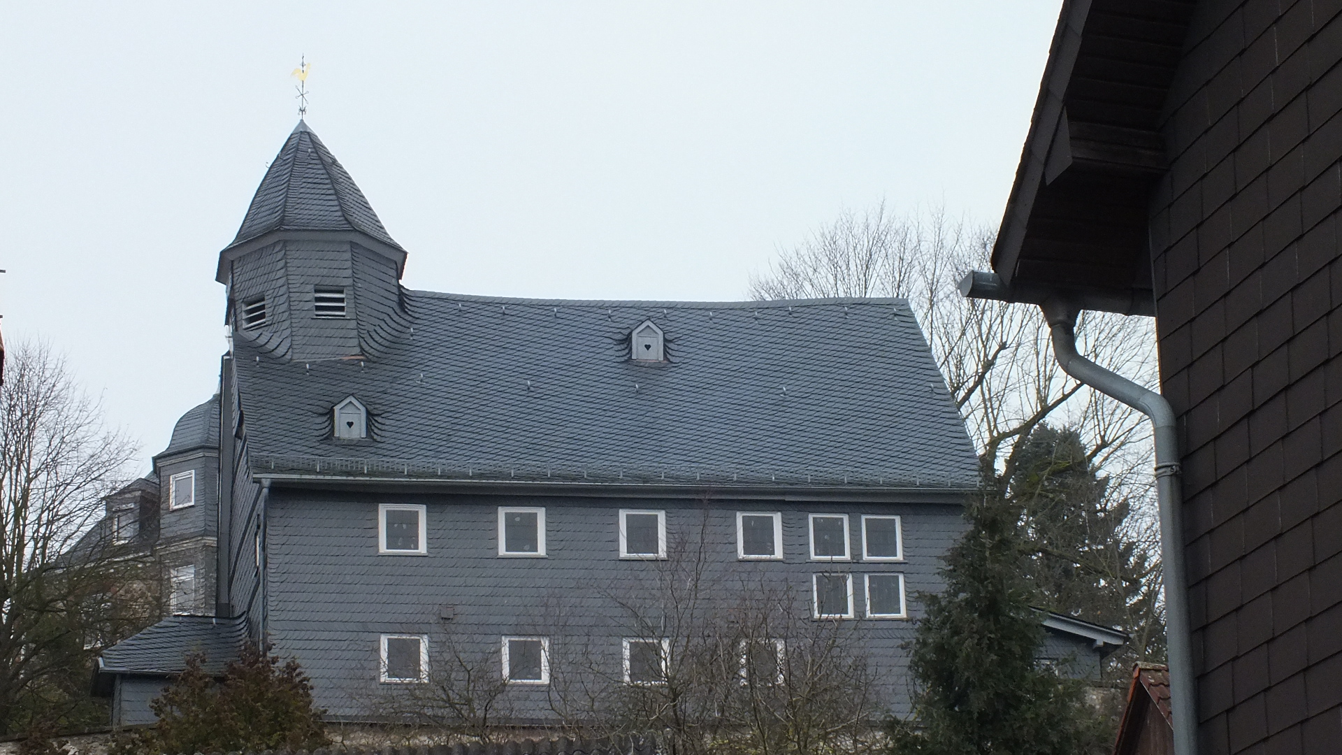 Evangelische Kirche Königsberg, Gemeinde Biebertal, Landkreis Gießen, Hessen, Deutschland